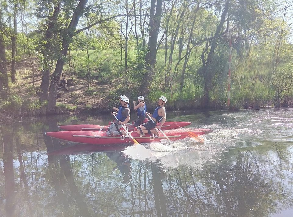 Кам'янське. Всеукраїнська дитячо-юнацька військово-патріотична гра «Сокіл» («Джура»). Міський етап. Сплав на катамаранах